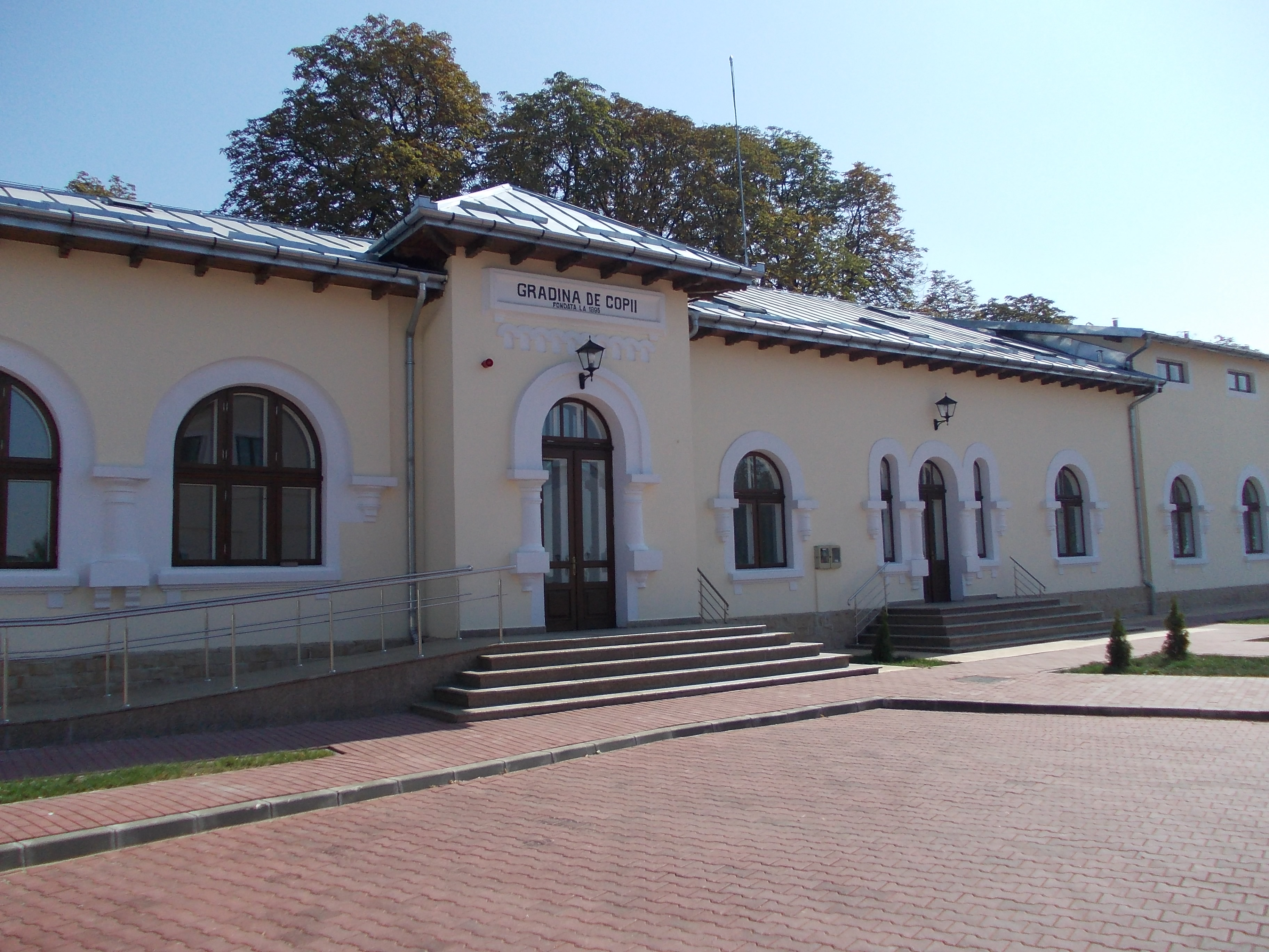 Grădinițadecopii 04